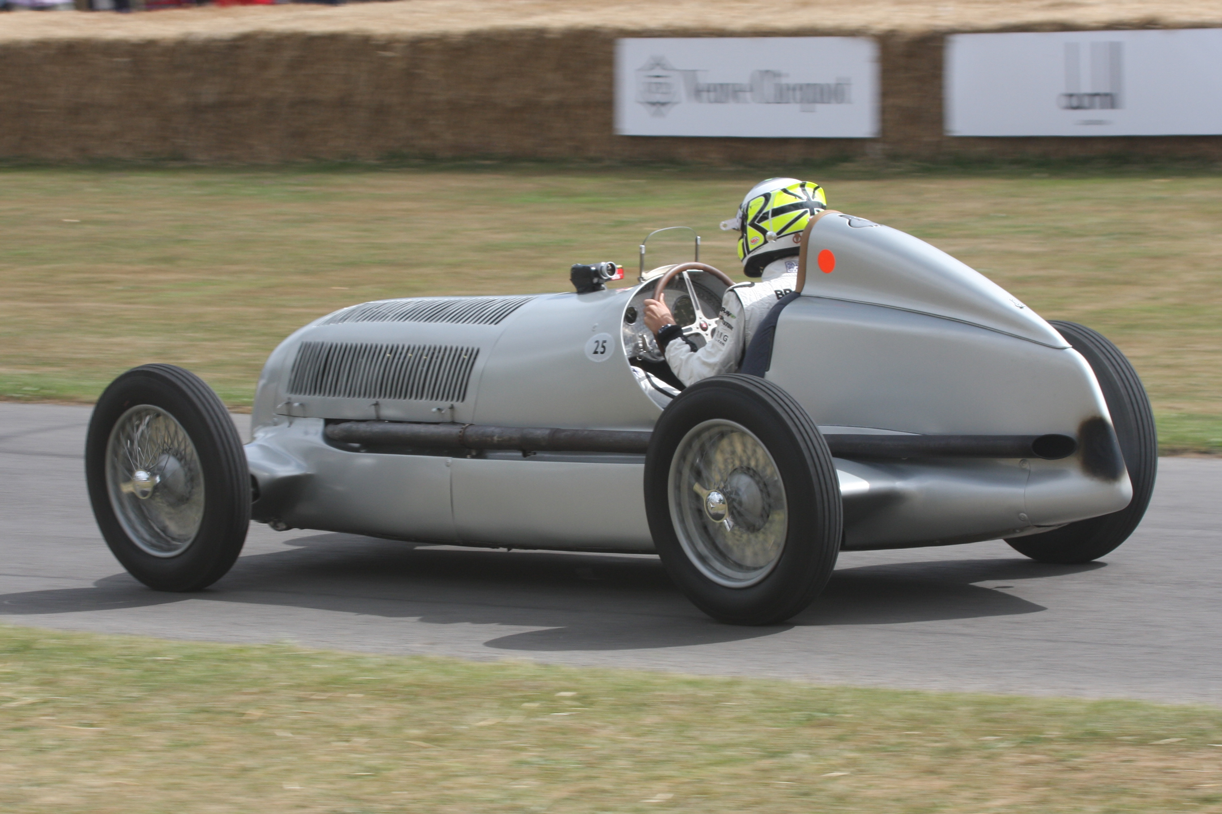 1934 Mercedes-Benz W25